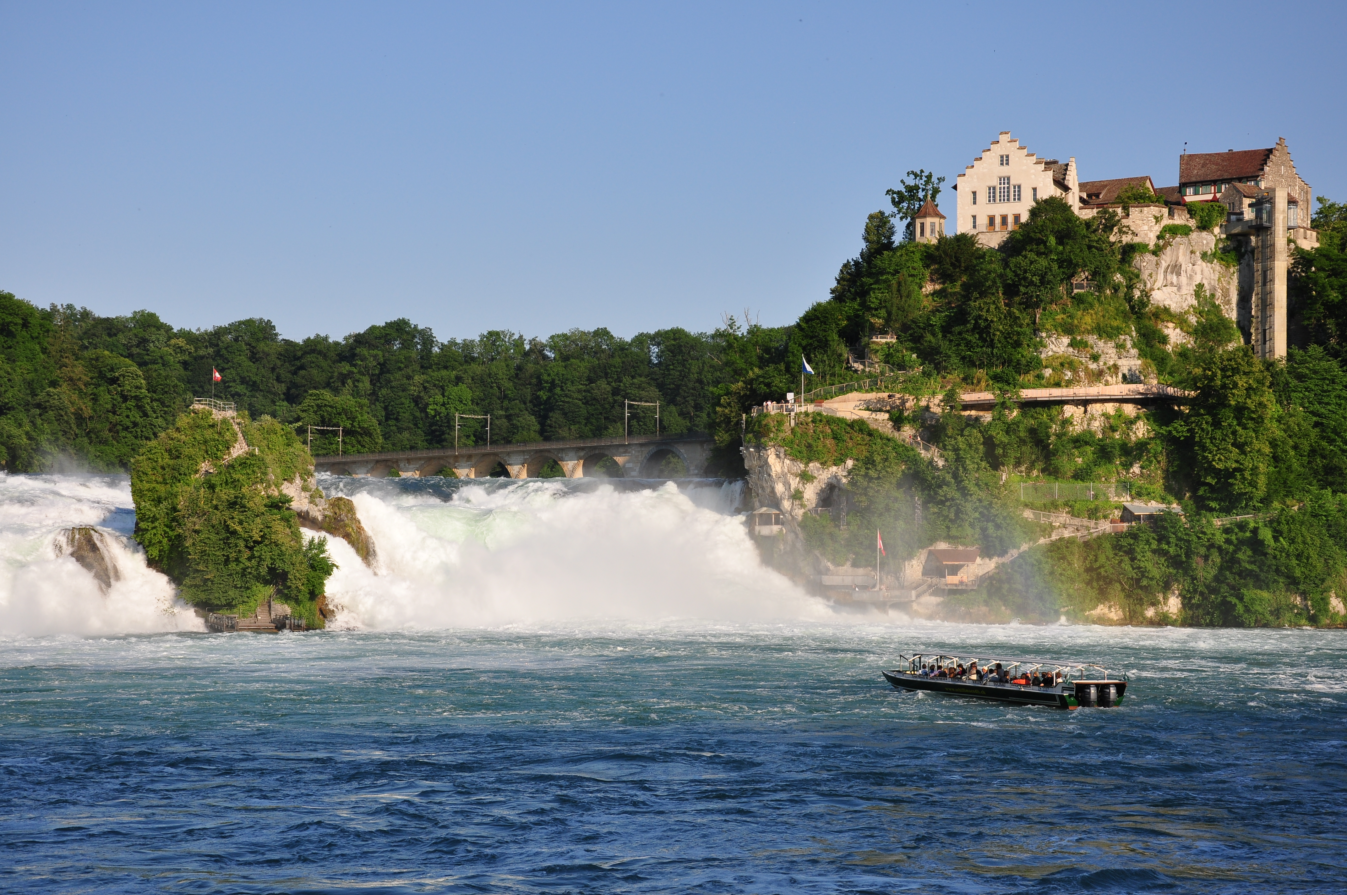 Rheinfall and Schloss Laufen in Laufen-Uhwiesen as seen from Neuhausen am Rheinfall (Switzerland)